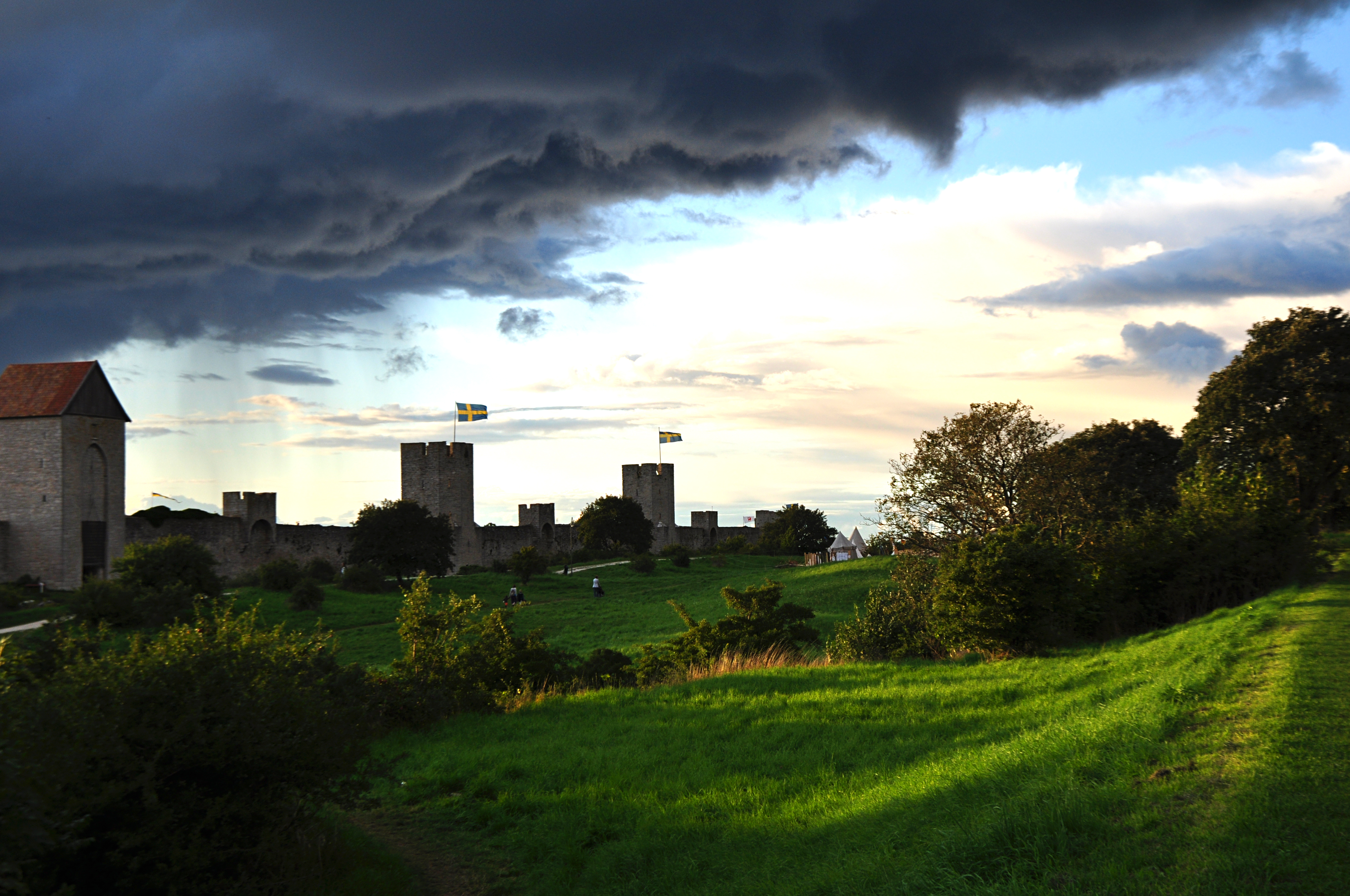 Hansestaden Visby har sedan 1995 varit en av Sveriges 15 världsarv. Fotot är taget under Medeltidsveckan 2011 med "Battle of Wisbys" härläger utanför ringmuren i Östergravar, då ett regnoväder nalkades.